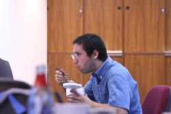 (Leandro nerd,Sandro